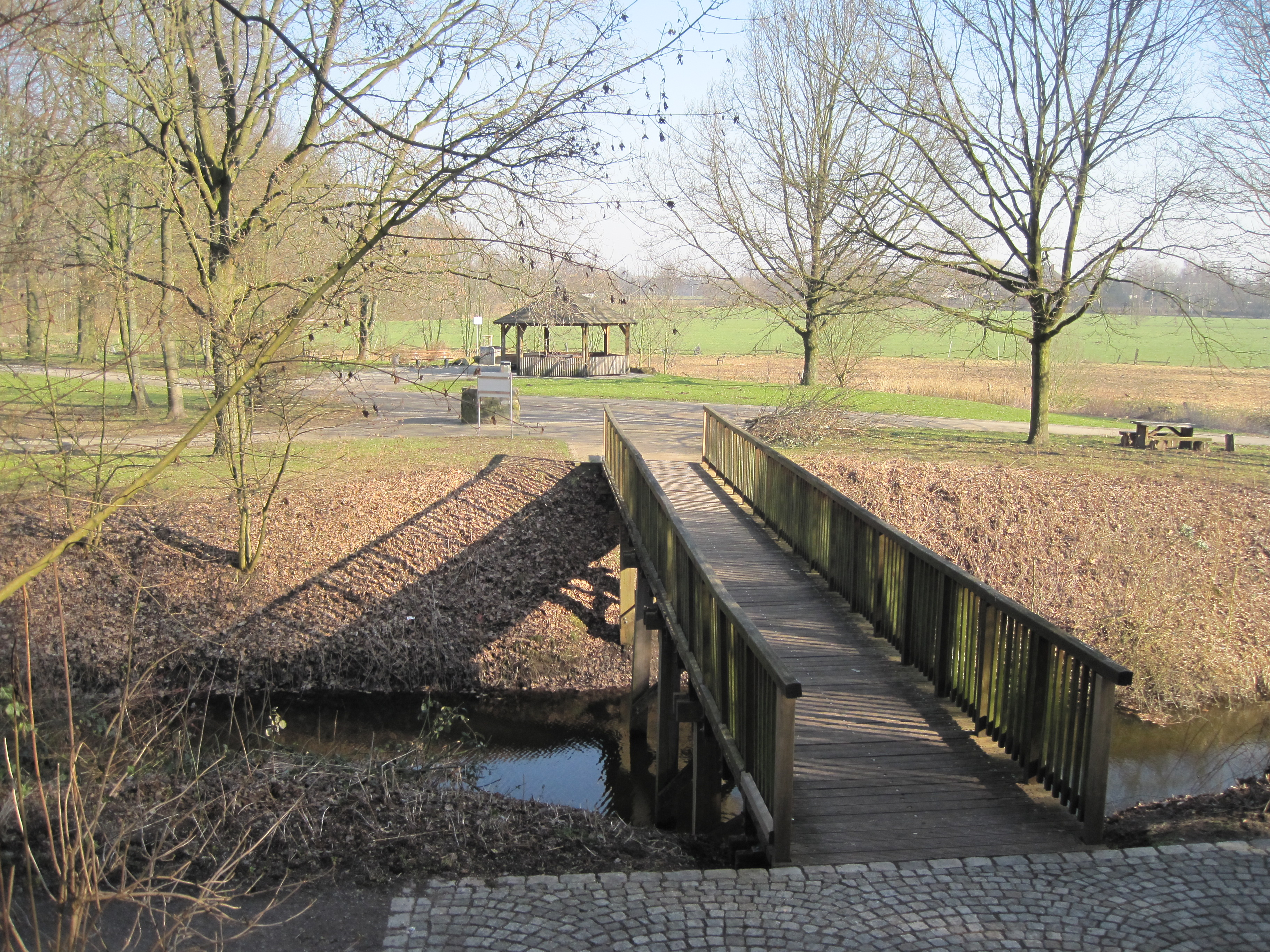 Das Foto zeigt Innengräfte, Bruunnen und Pavillon auf der Vorburg des Burghügels Mark in Hamm mit Blick von der Brücke zur Hauptburg.